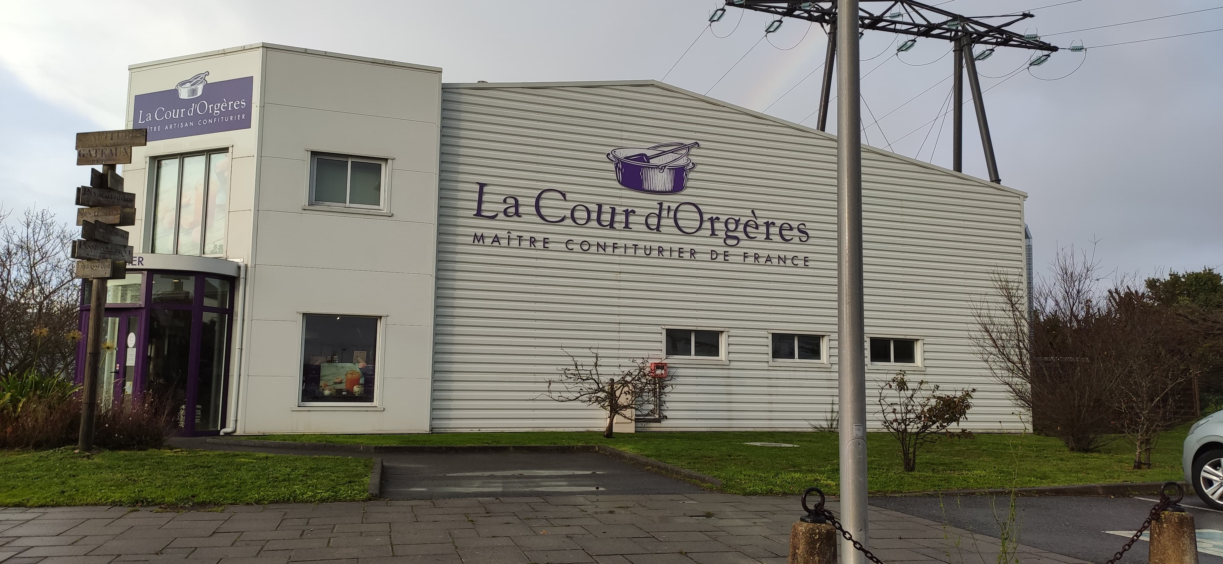 Bâtiment la Cour d'Orgère zone artisanale